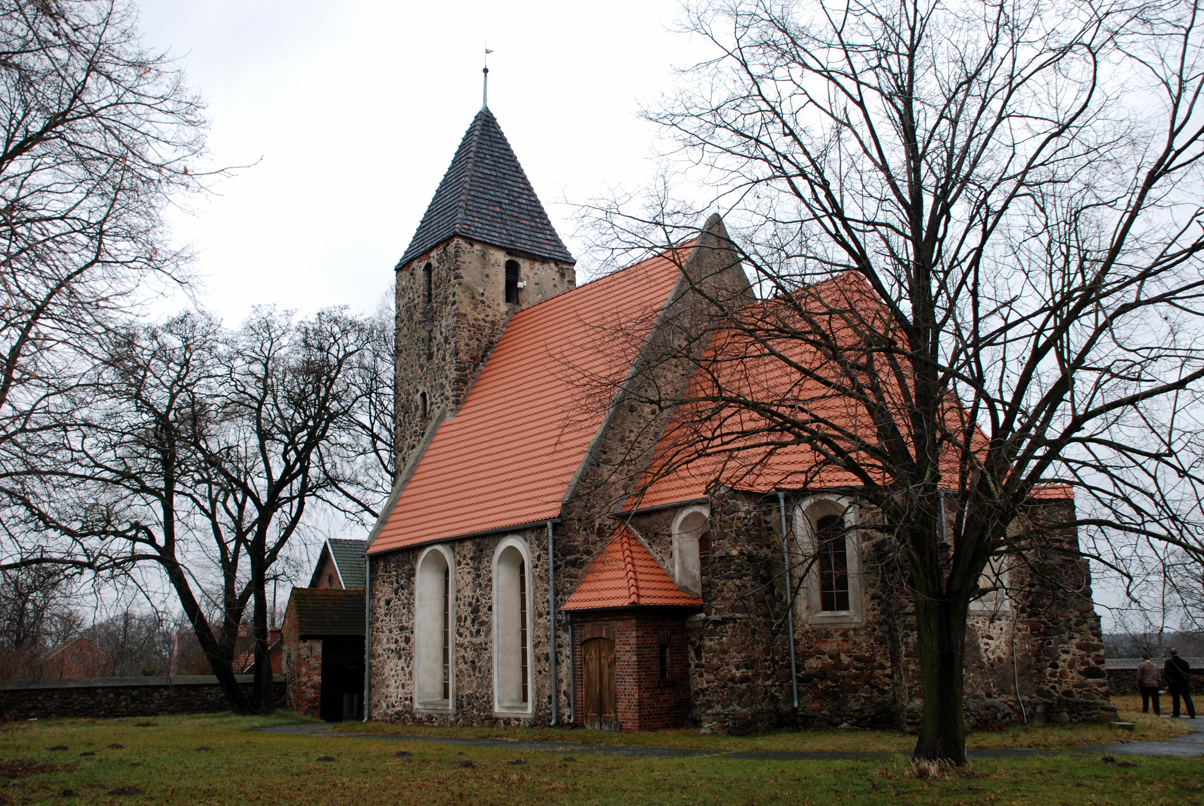 Białowice - kościół filialny p.w. Najświętszego Serca Jezusa, XV/XVI